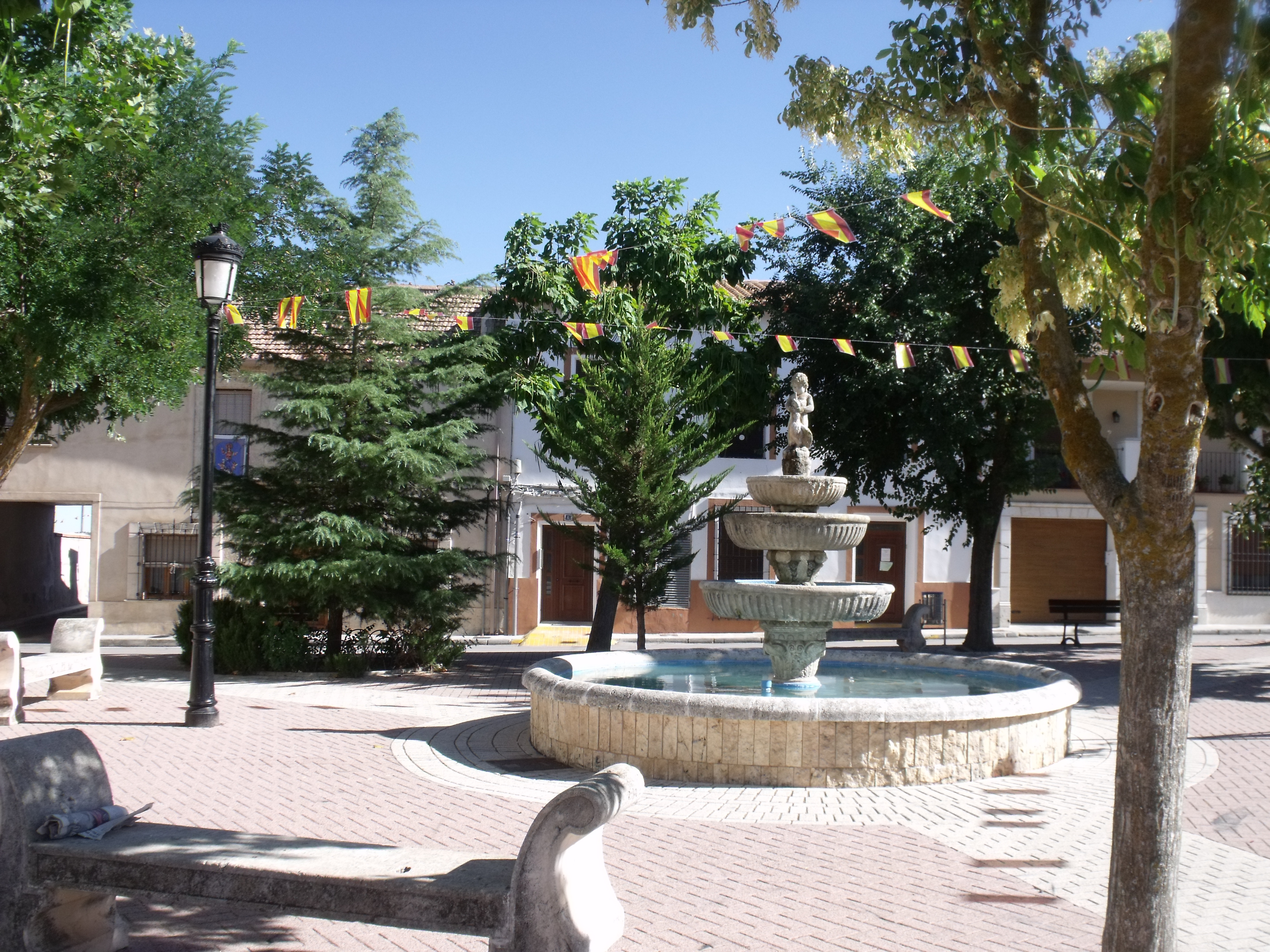 Fuente en una plaza